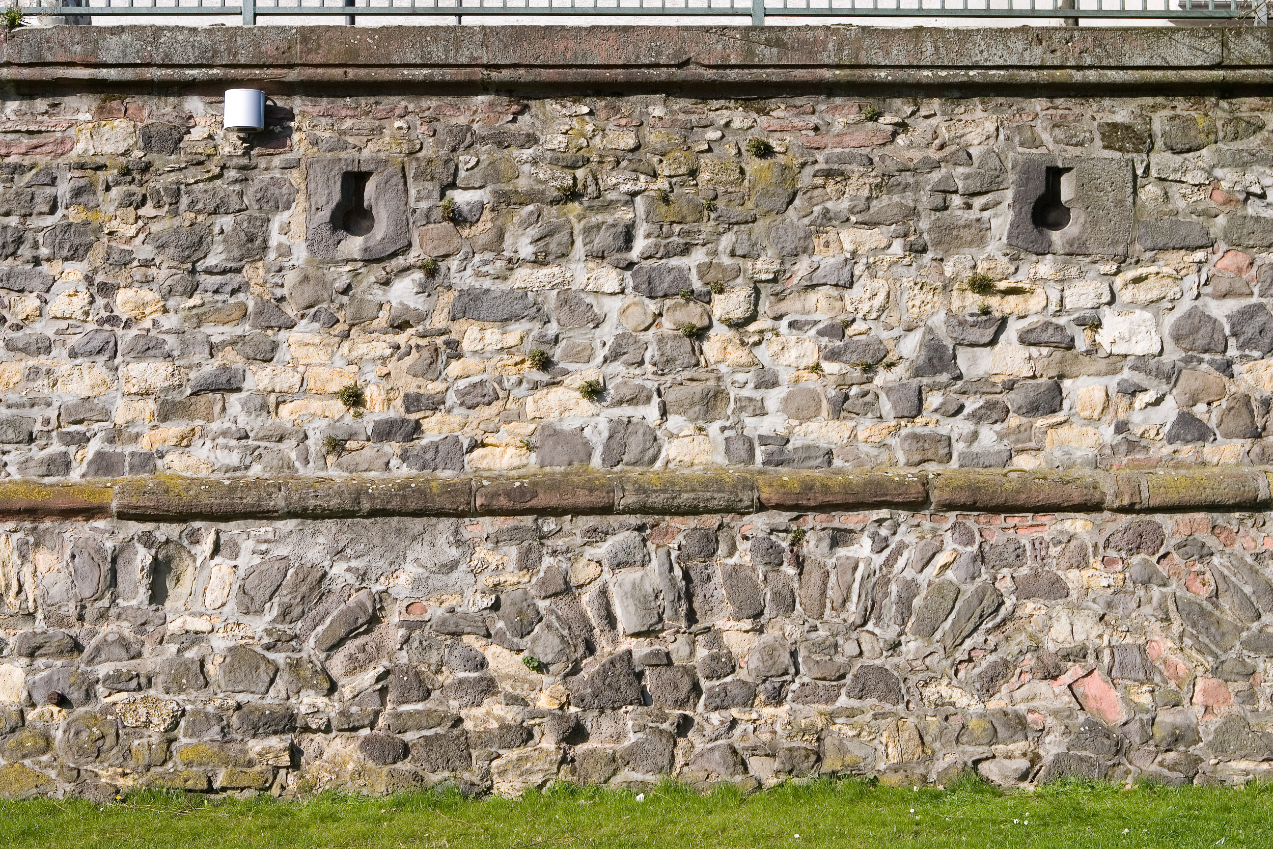 Schießscharten und Bogenstellungen in der Mainmauer auf Höhe der Schönen Aussicht, Rest der mittelalterlichen Stadtbefestigung von Frankfurt am Main. Selber fotografiert im März 2008, Doppellizensierung GFDL & CC-BY-SA 2.5.